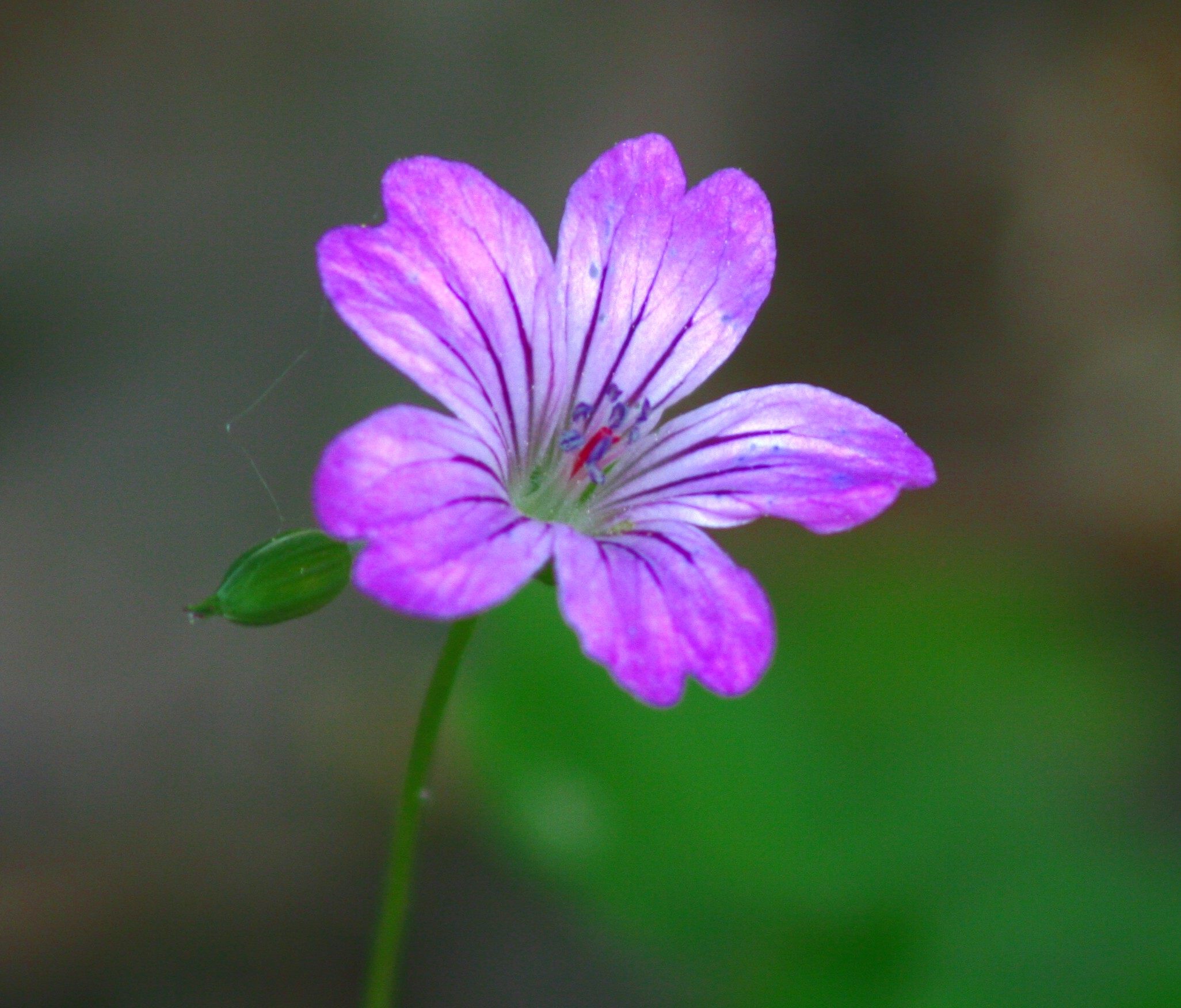 Geranio nodoso - Località Noal, Trichiana (BL), 514 m s.l.m.